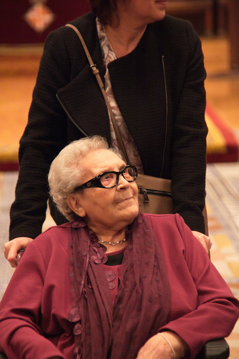 Acte de lliurament a Neus Català de la medalla d'Or al Mèrit Cívic de l'Ajuntament de Barcelona. 29-10-2014